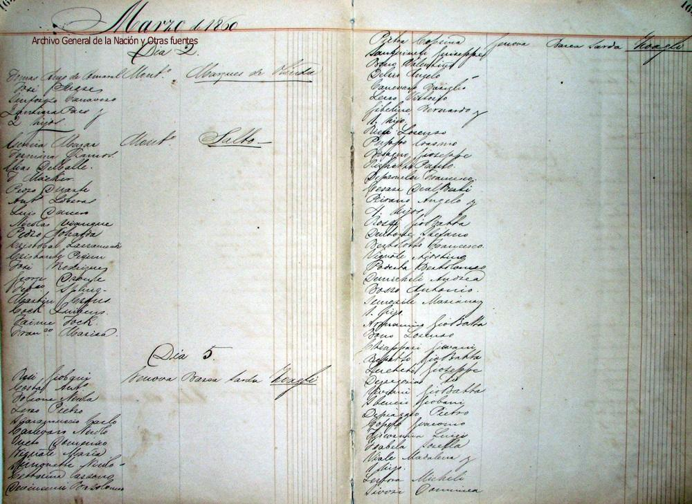 Entrada de pasajeros al puerto de Buenos Aires, Sinforoso Canaveris, su esposa Quintina Páez y dos hijos procedentes de Montevideo, a bordo del buque Marquês de Olinda.